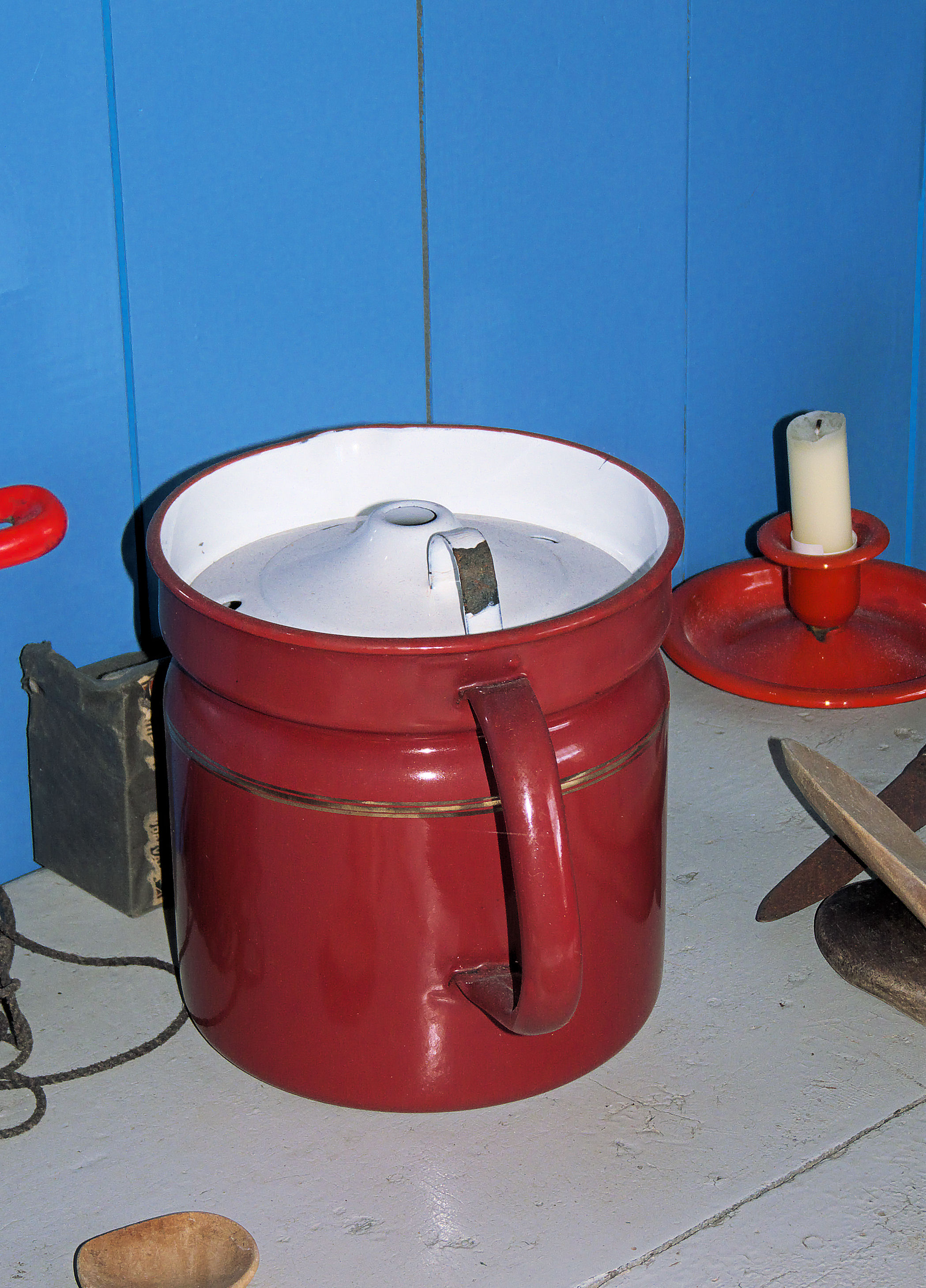 melkkoker